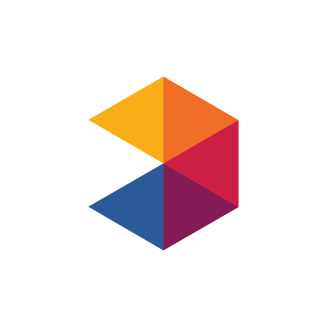 Logo Memrise